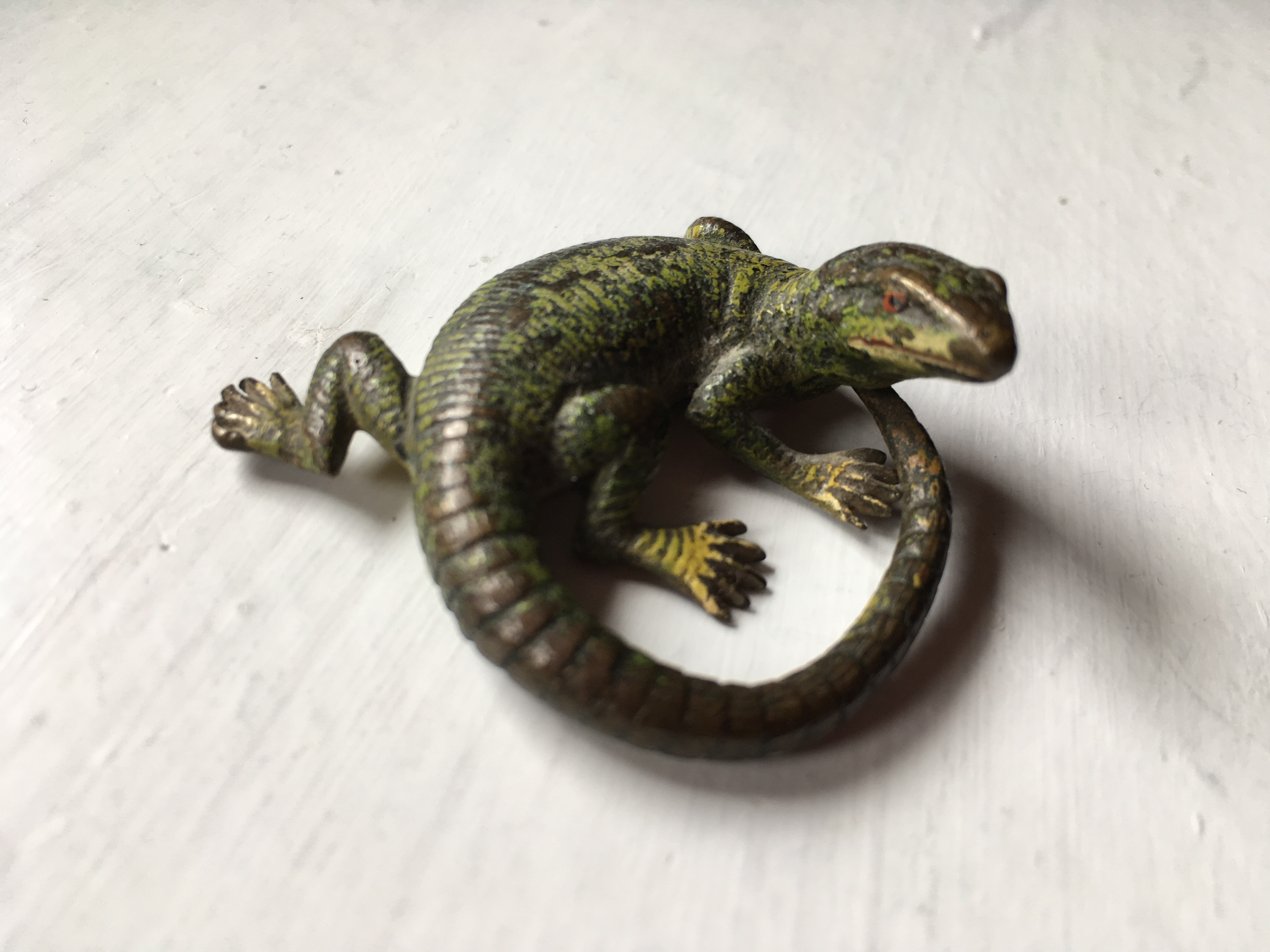 Eidechse aus Wiener Bronze ca. 1944 als Mitbringsel